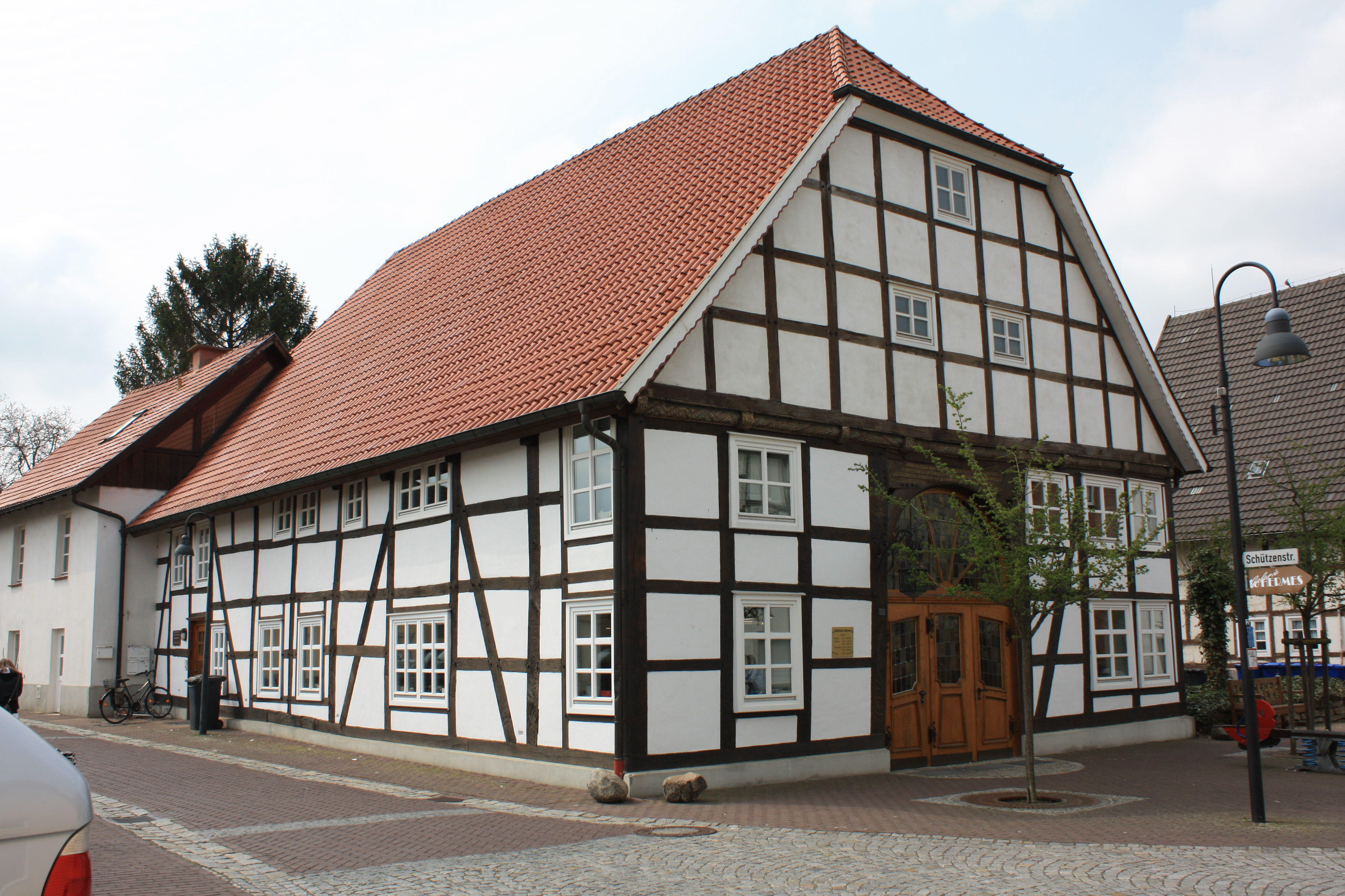 Städtische Bücherei Salzkotten This is the photograph of an architectural monument. It is part of the list of cultural monuments of Salzkotten, no. 101